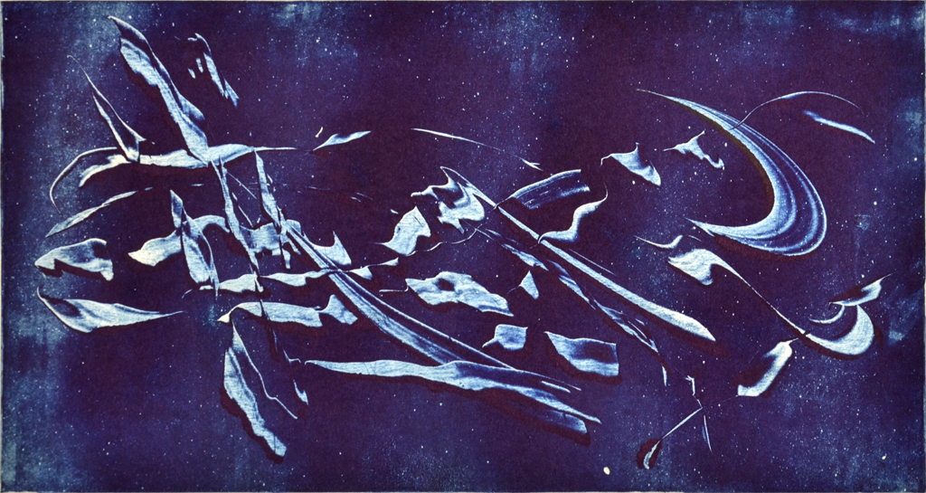 Oldřich Hamera, Vesmír, monotyp, 20x37 cm, 1965